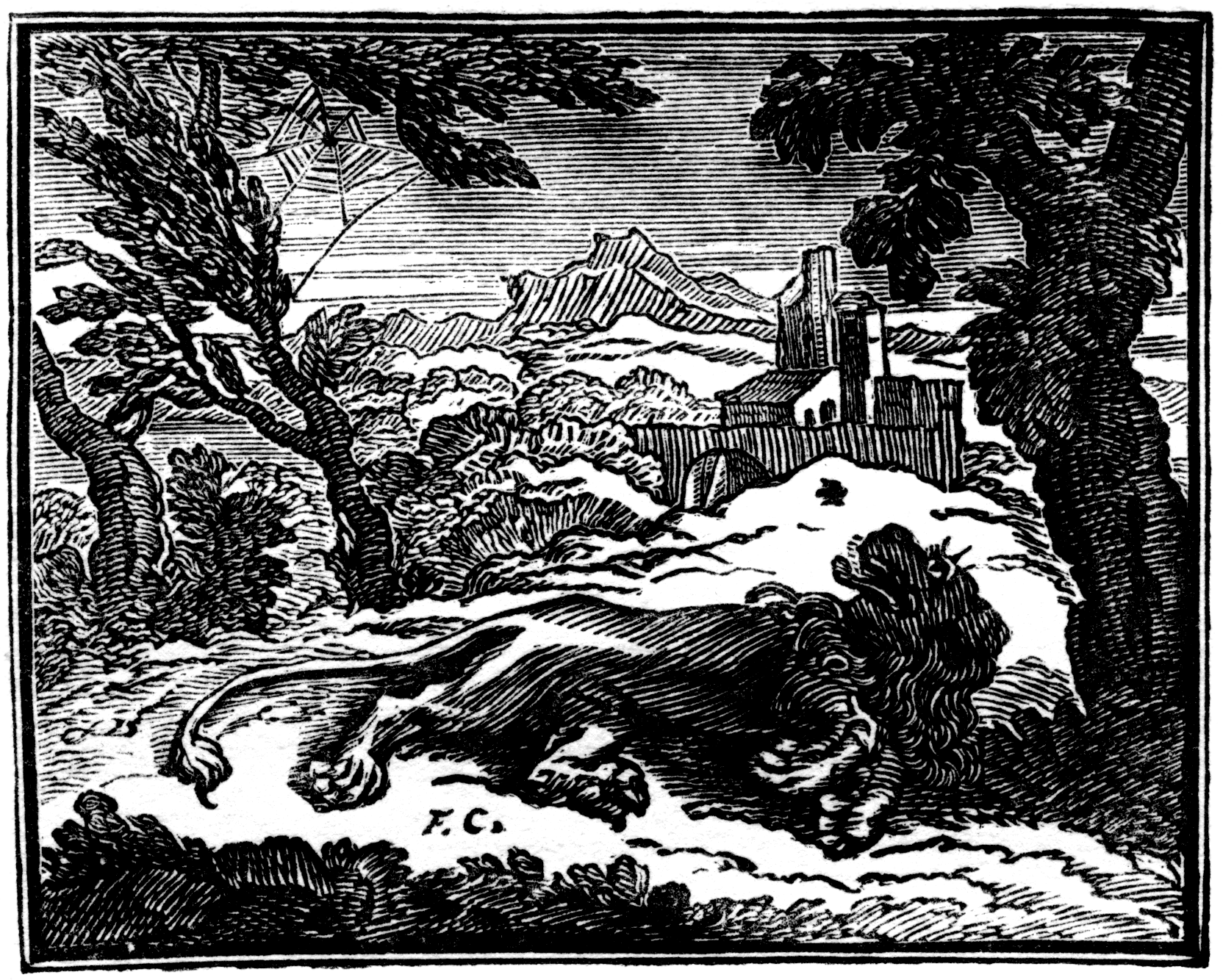 Illustrations pour les « Fables choisies mises en vers par M. de la Fontaine », Claude Barbin et Denys Thierry, Paris, 1668 (premier recueil) 1678-79 (deuxième recueil) 1694 (troisième recueil). Numérotation Charpentier (1705).